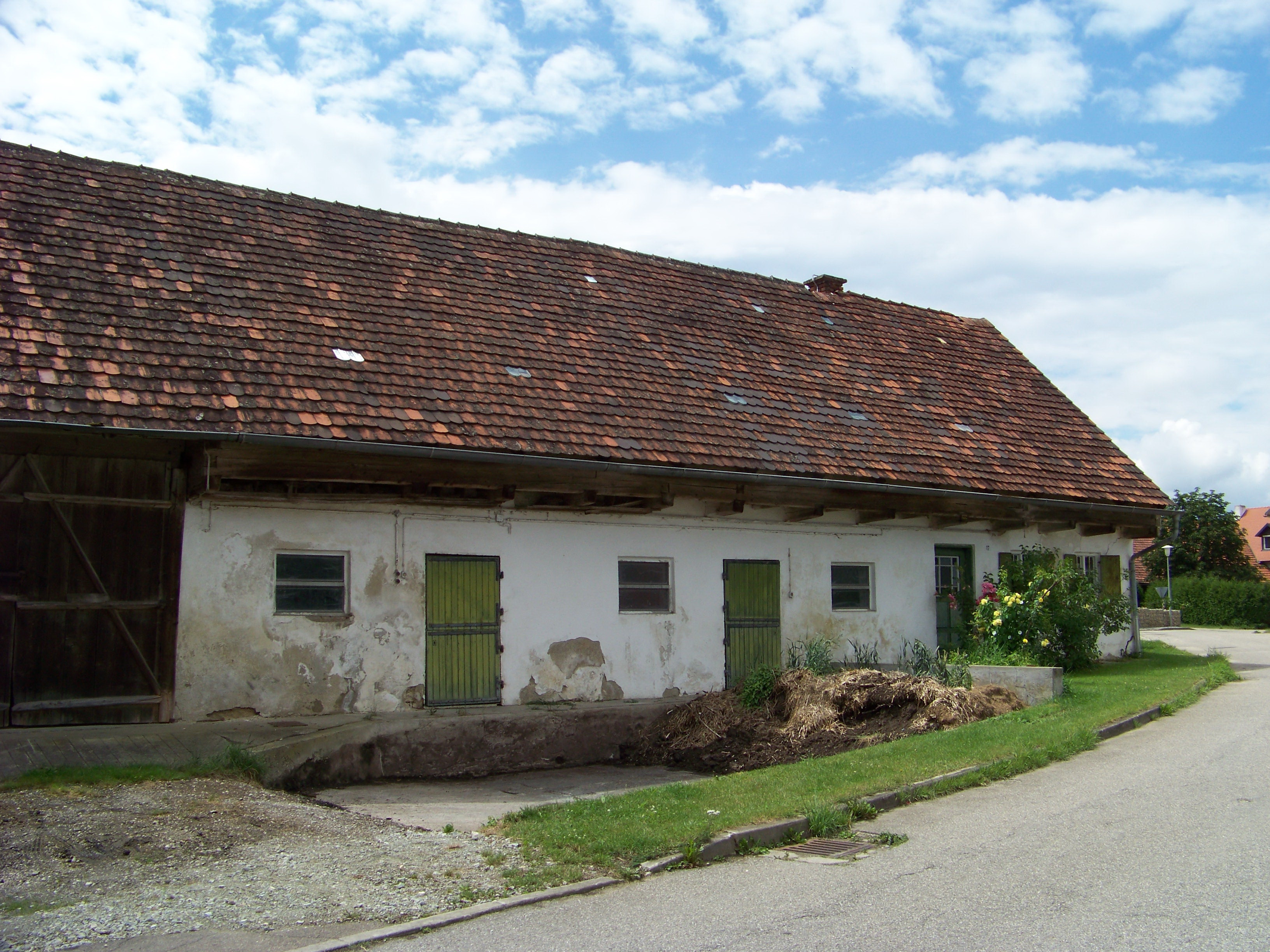 Pfeffenhausen, Ludmannsdorf. Ehem. Schmiede, erdgeschossiger Greddachbau mit Flug-Kniestock, 1832.